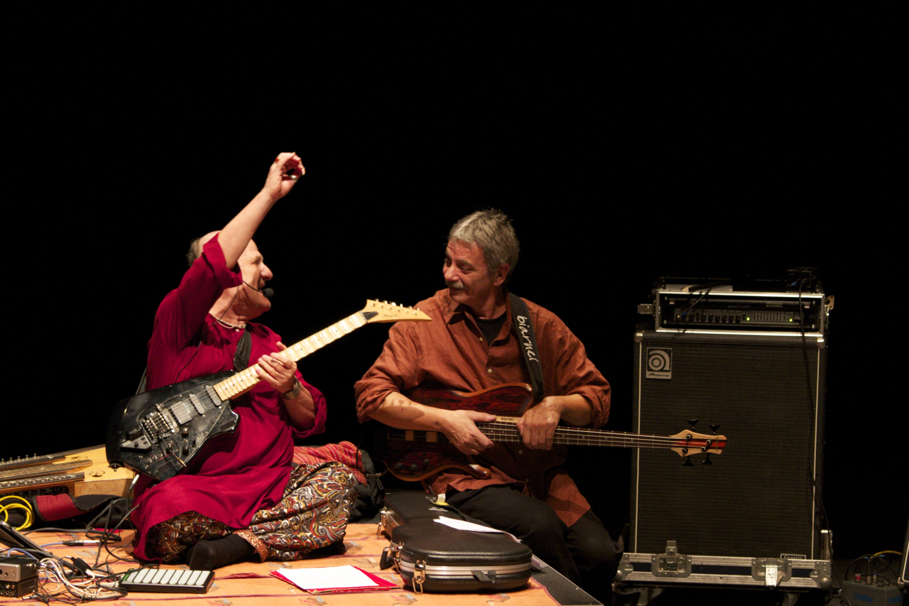 Paolo Tofani scherza con Ares Tavolazzi durante un concerto degli Area a Pontedera (PI).